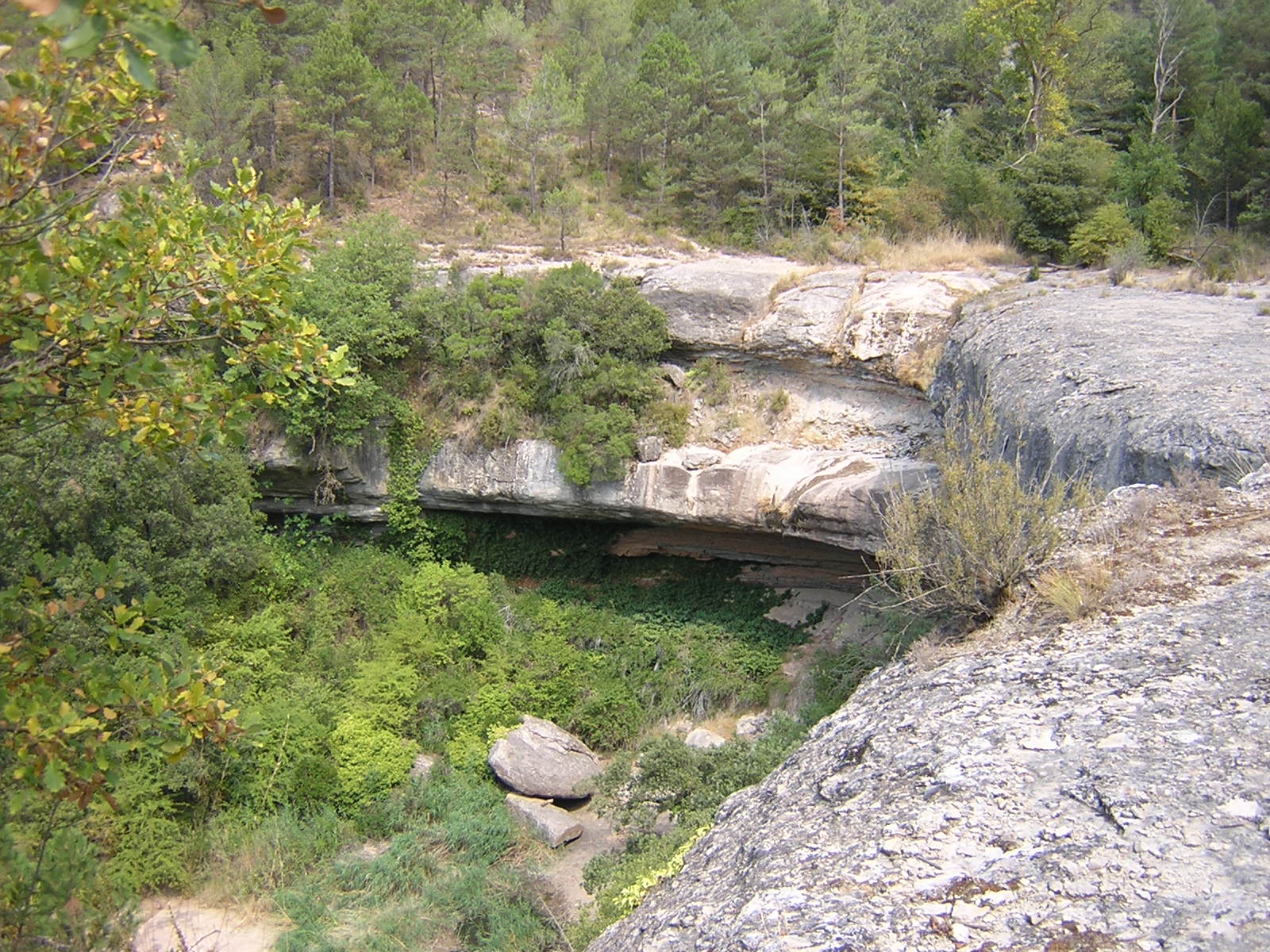 El Salt de la Baga Cerdana (Monistrol de Calders, Moianès)